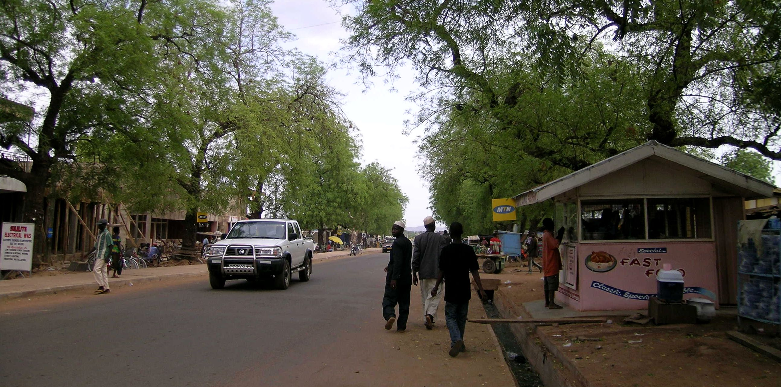 Street in Bolgatanga, Ghana